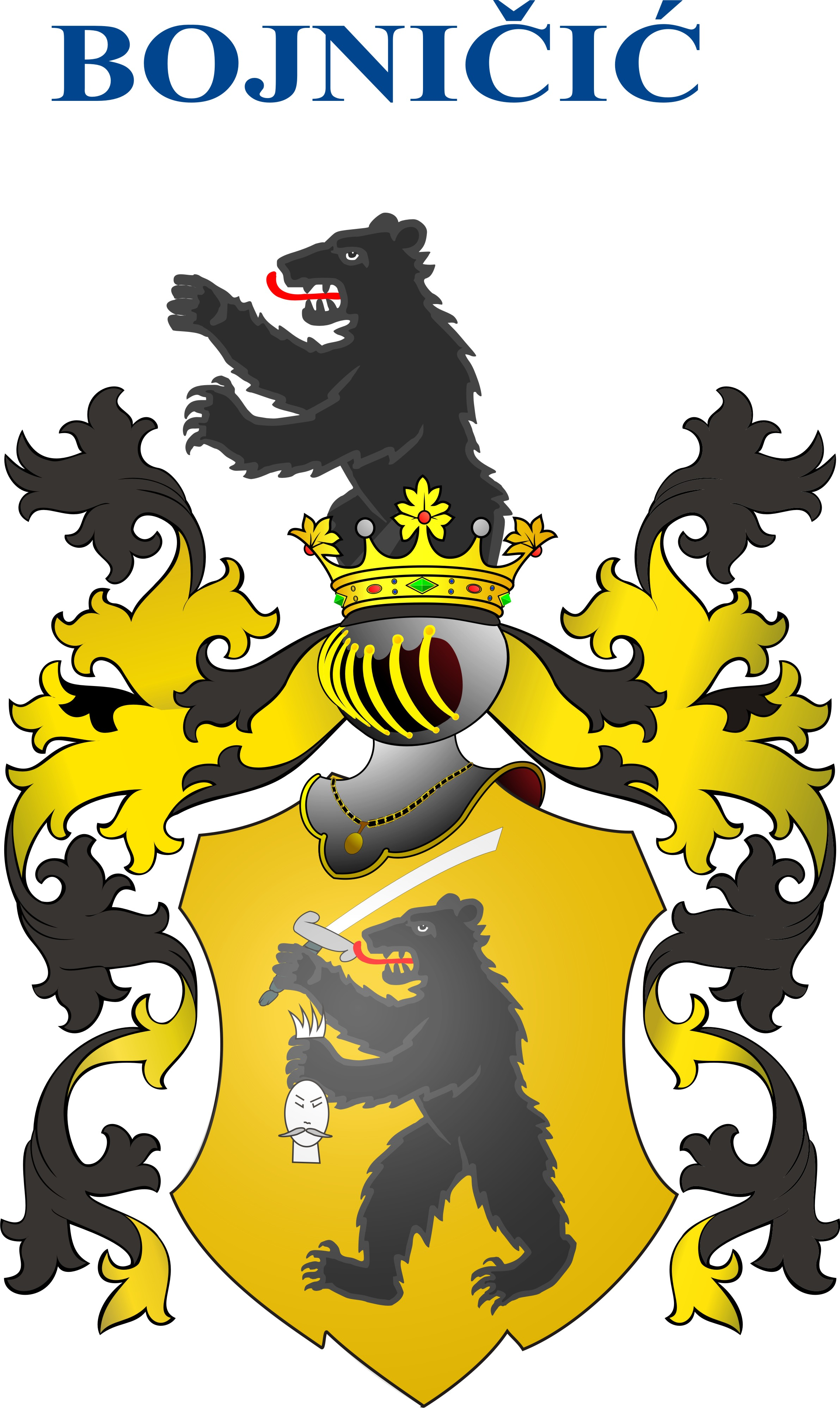 Grb obitelji Bojničić